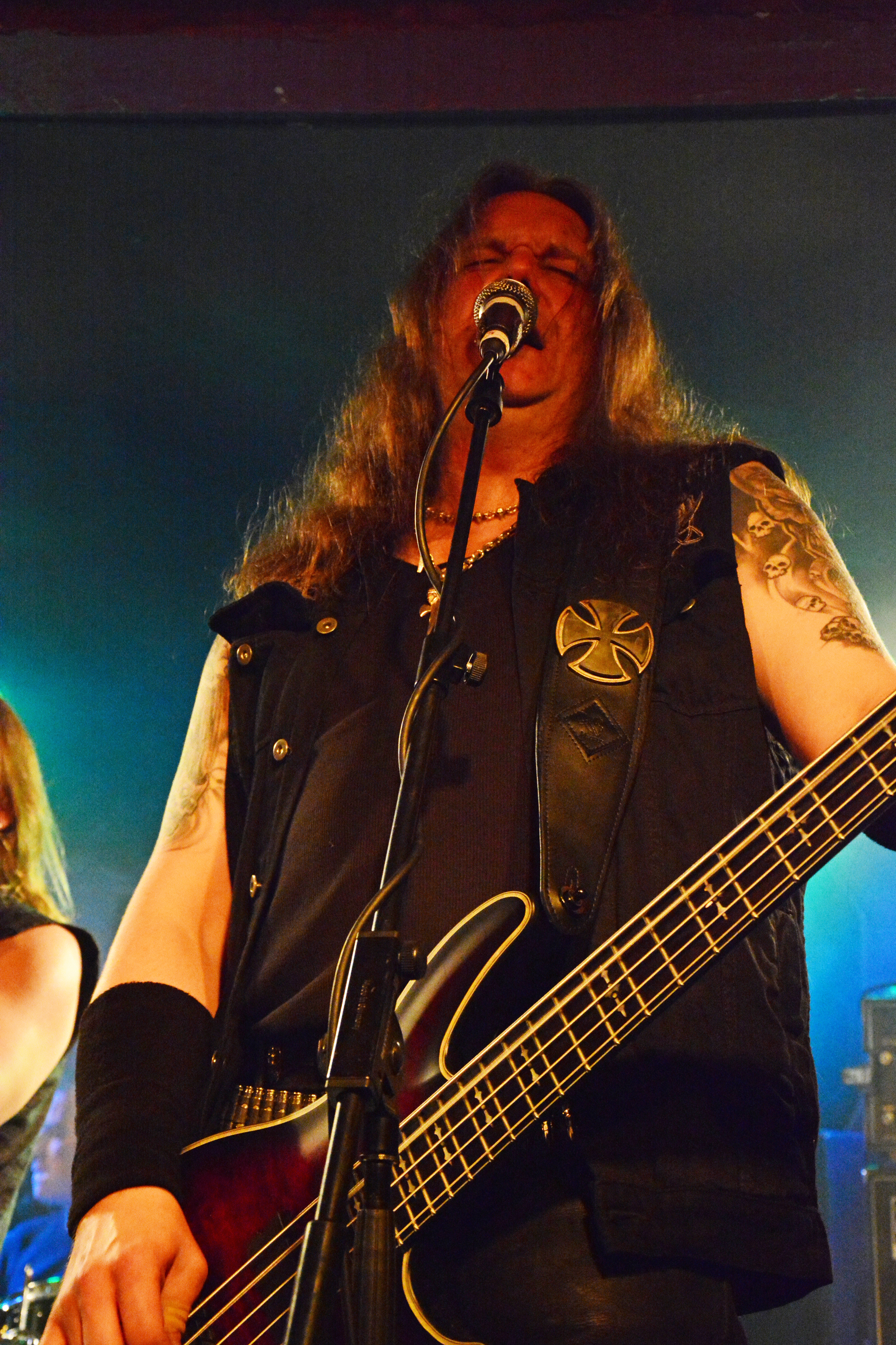 Bassist Jan Bünning von Paragon bei den Hamburg Metal Dayz 2013